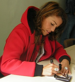 Nadiya qui signe un autographe